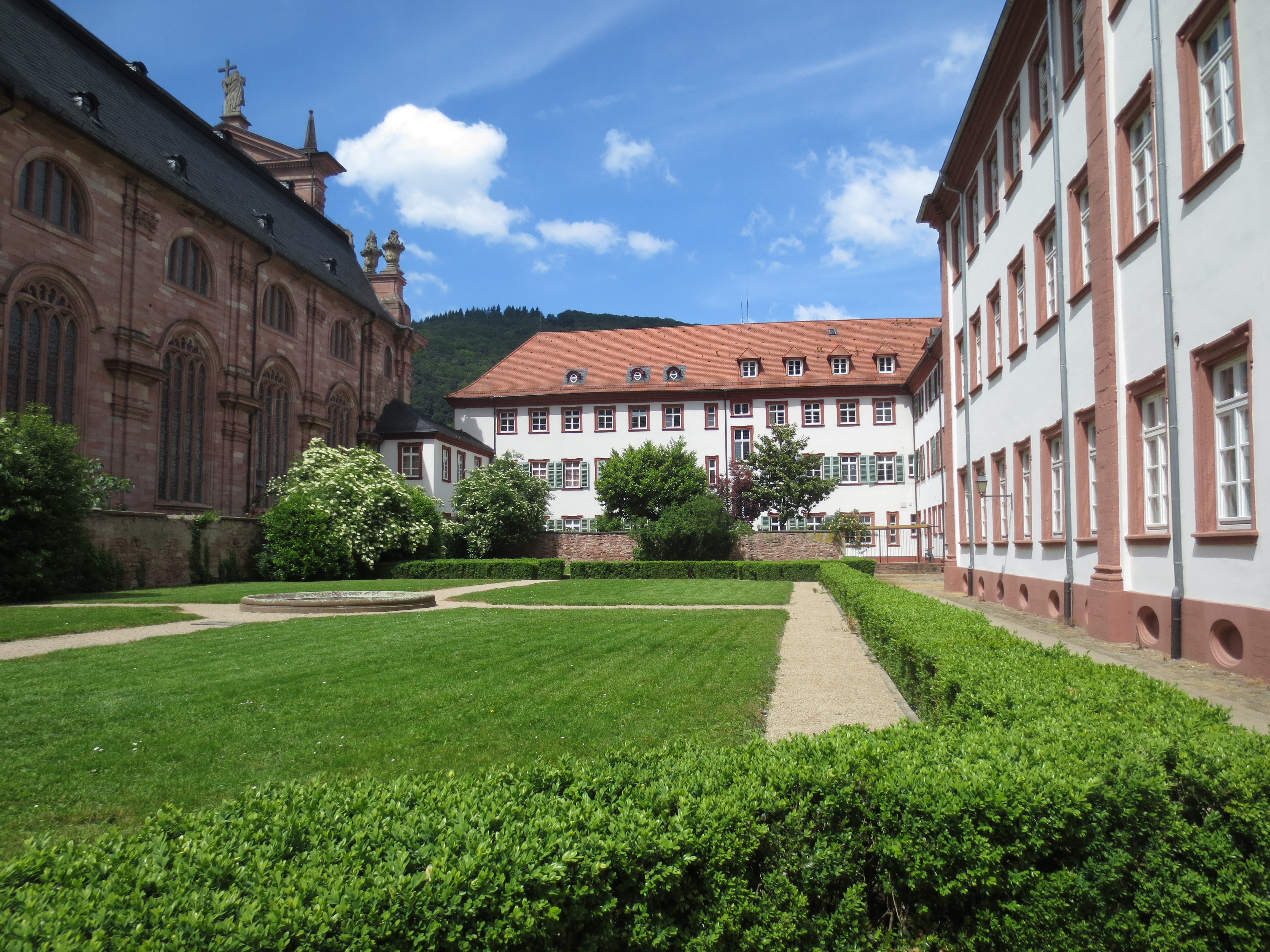 Jesuitenkirche Heidelberg, Teilansicht Ostfront des Langhauses mit Gartenanlage und dem Gebäudekomplex der ehemaligen Jesuitenschule